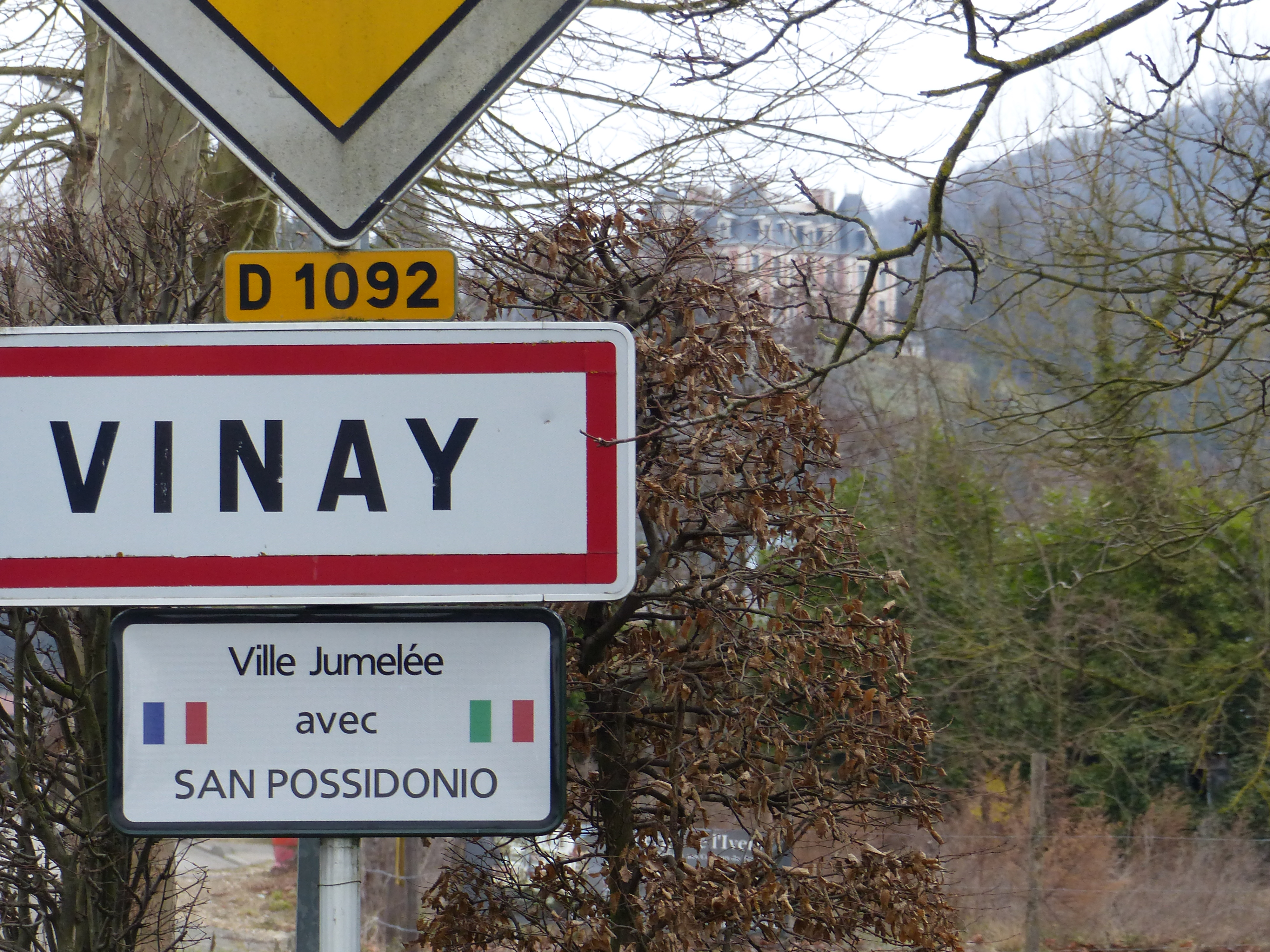 Les Villes de Vinay et San Possidonio ont scellé leur amitié par une charte de jumelage en juin 2013.